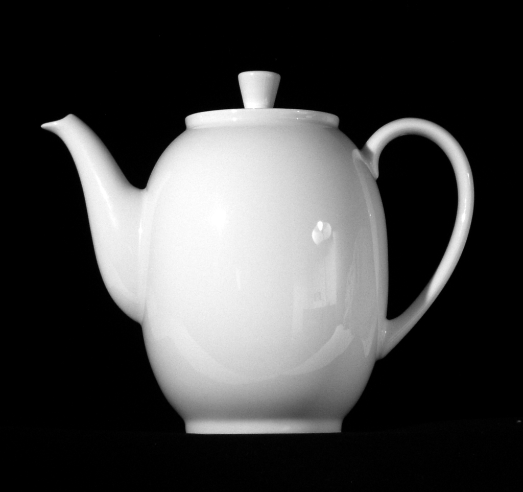 Foto der Kaffeekanne des Service 1382 von Arzberg, Design Dr. Hermann Gretsch